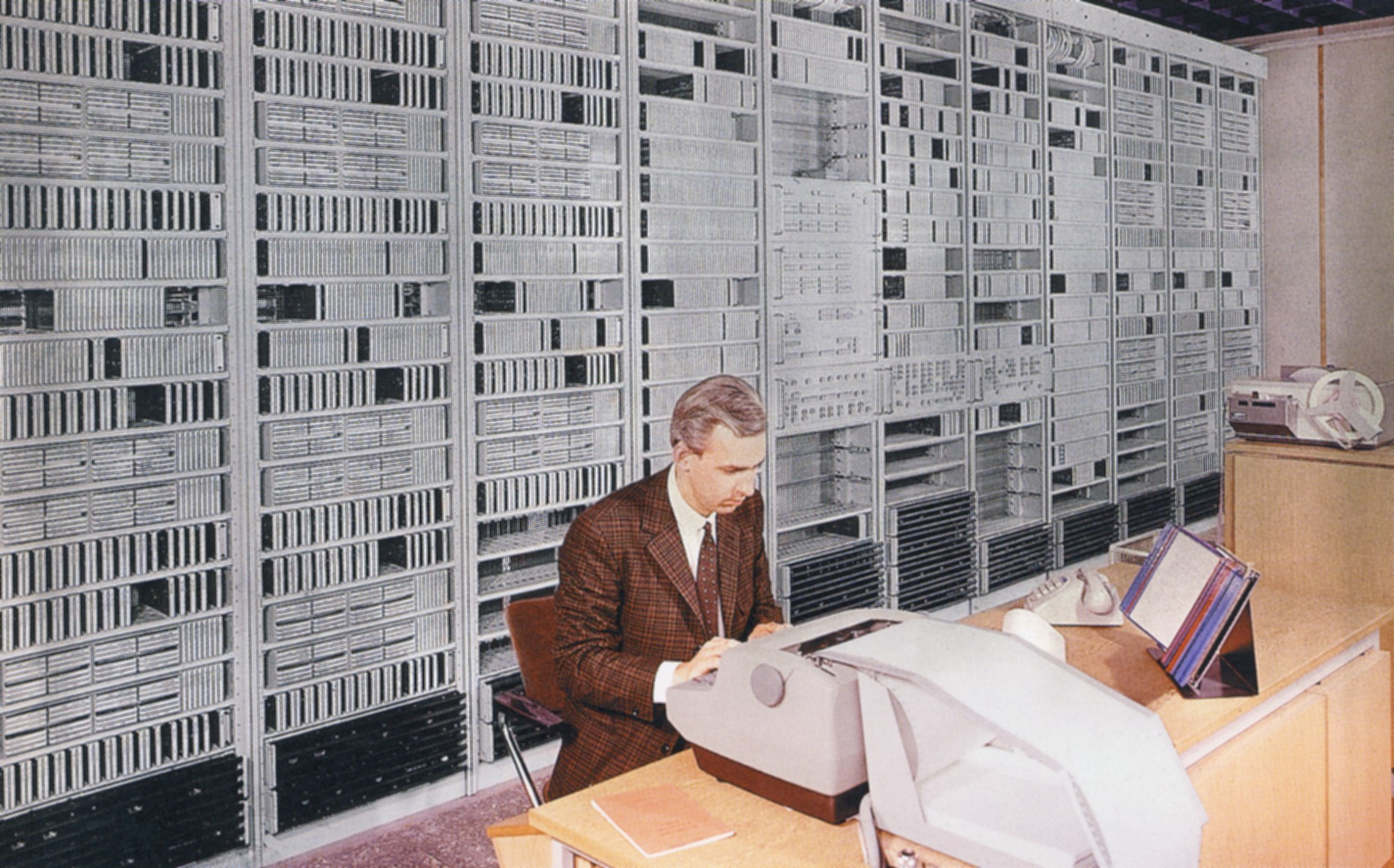 Ericssons första digitala AKE 12-station i Tumba